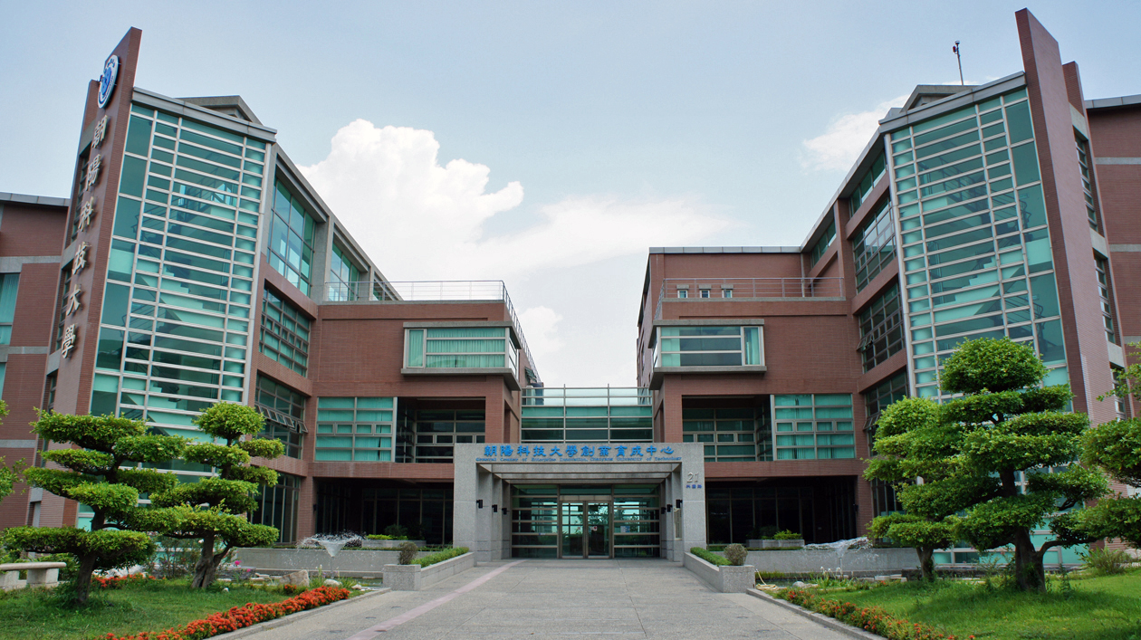 朝陽科技大學創業育成中心，位於臺中市西屯區中部科學工業園區科園路21號。